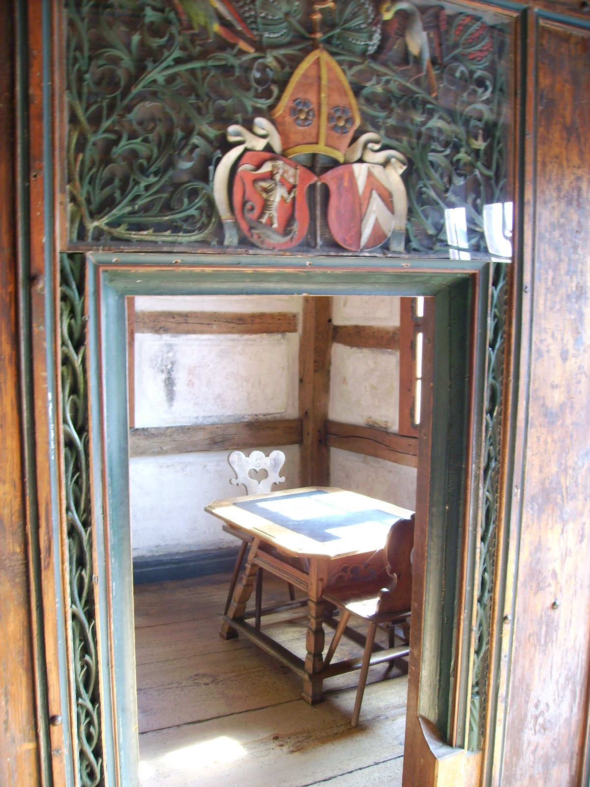 Das Kloster St. Georgen war eine Benediktinerabtei in Stein am Rhein im Kanton Schaffhausen, Schweiz. Schutzpatrone des Klosters waren St. Georg und St. Cyrill. Es handelt sich um eine der am besten erhaltenen mittelalterlichen Klosteranlagen der Schweiz.